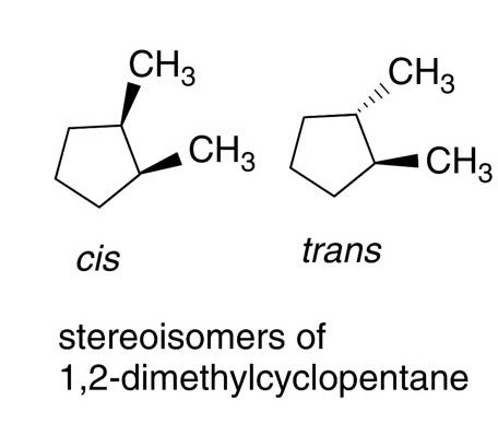 cis e trans ciclos